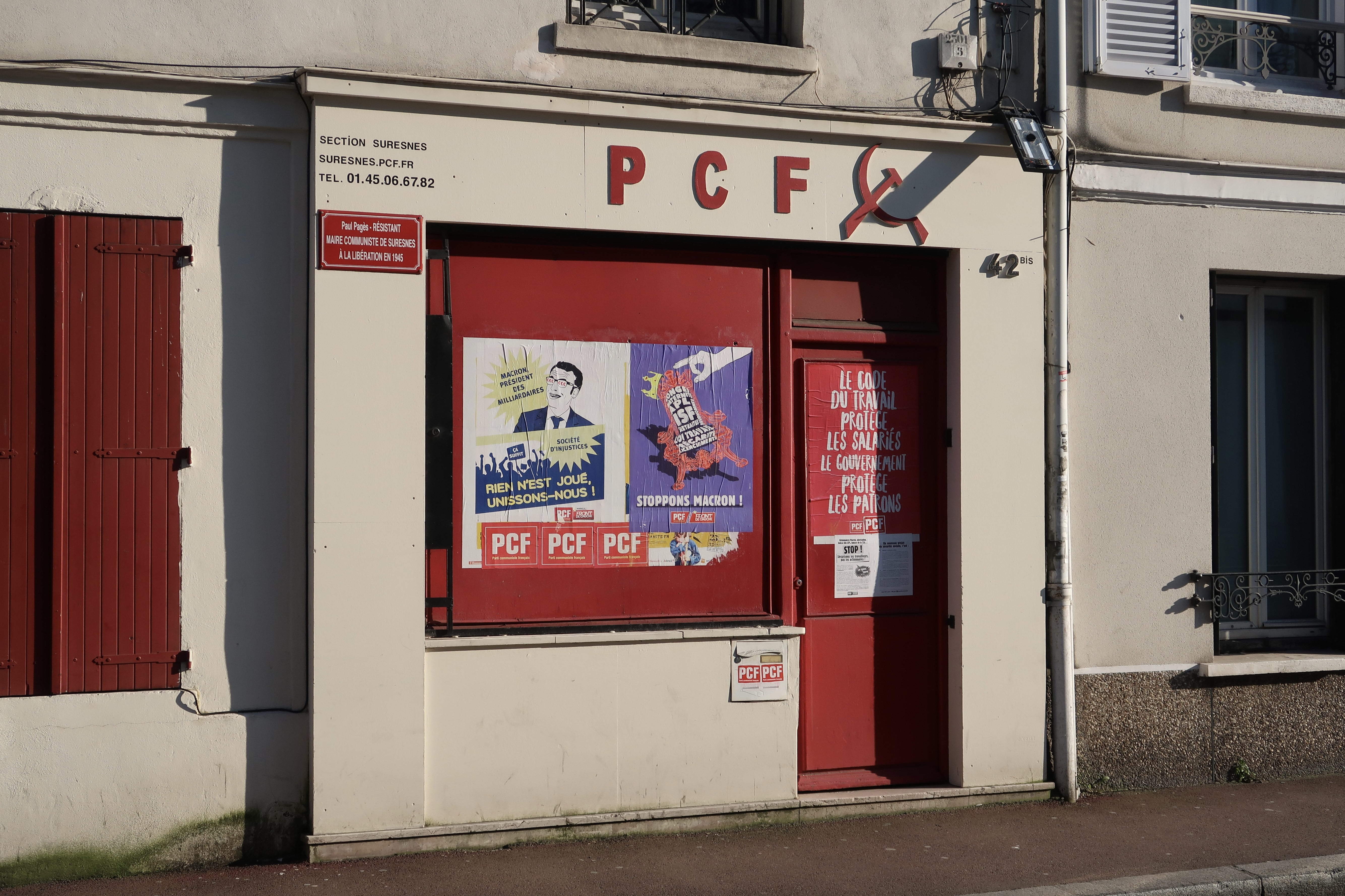 Siège de la section Parti communiste français à Suresnes (Hauts-de-Seine), 42 bis rue de Verdun.